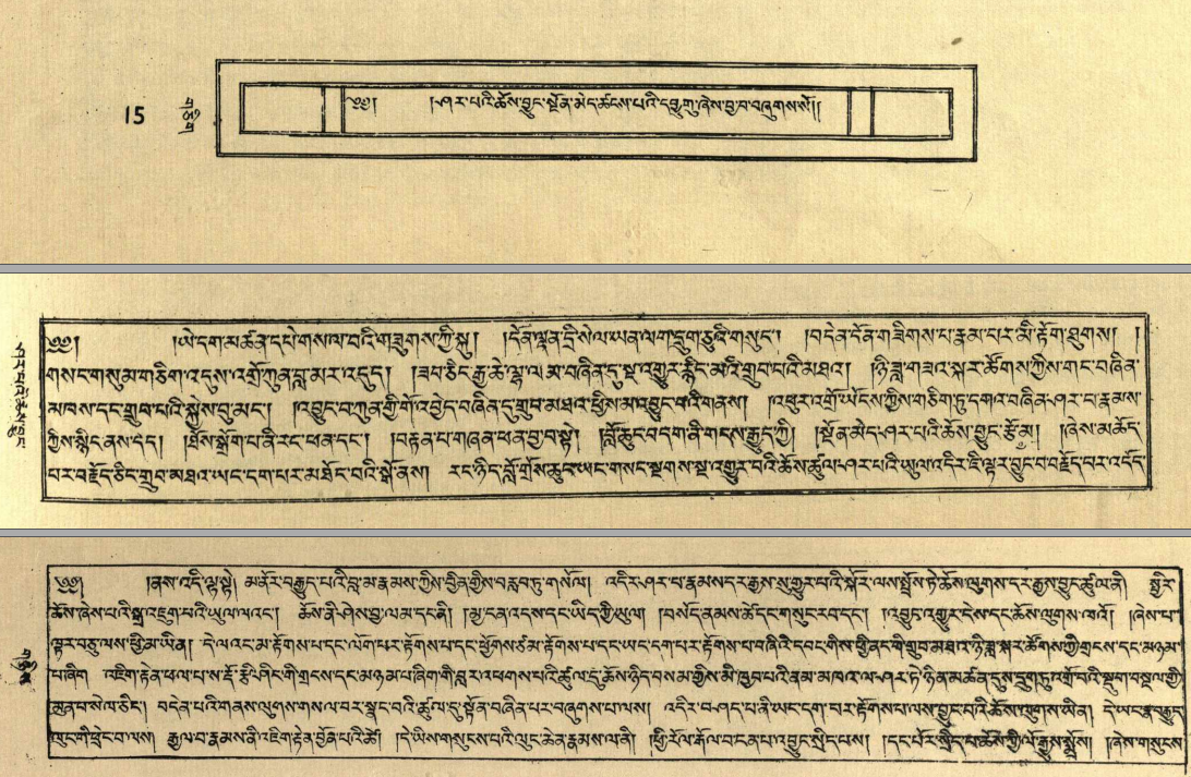 नेपाली: लामा सङ्ग्यास तन्जिन द्वारा लिखित शेर्पा इतिहासको पांडुलिपि पृष्ठ